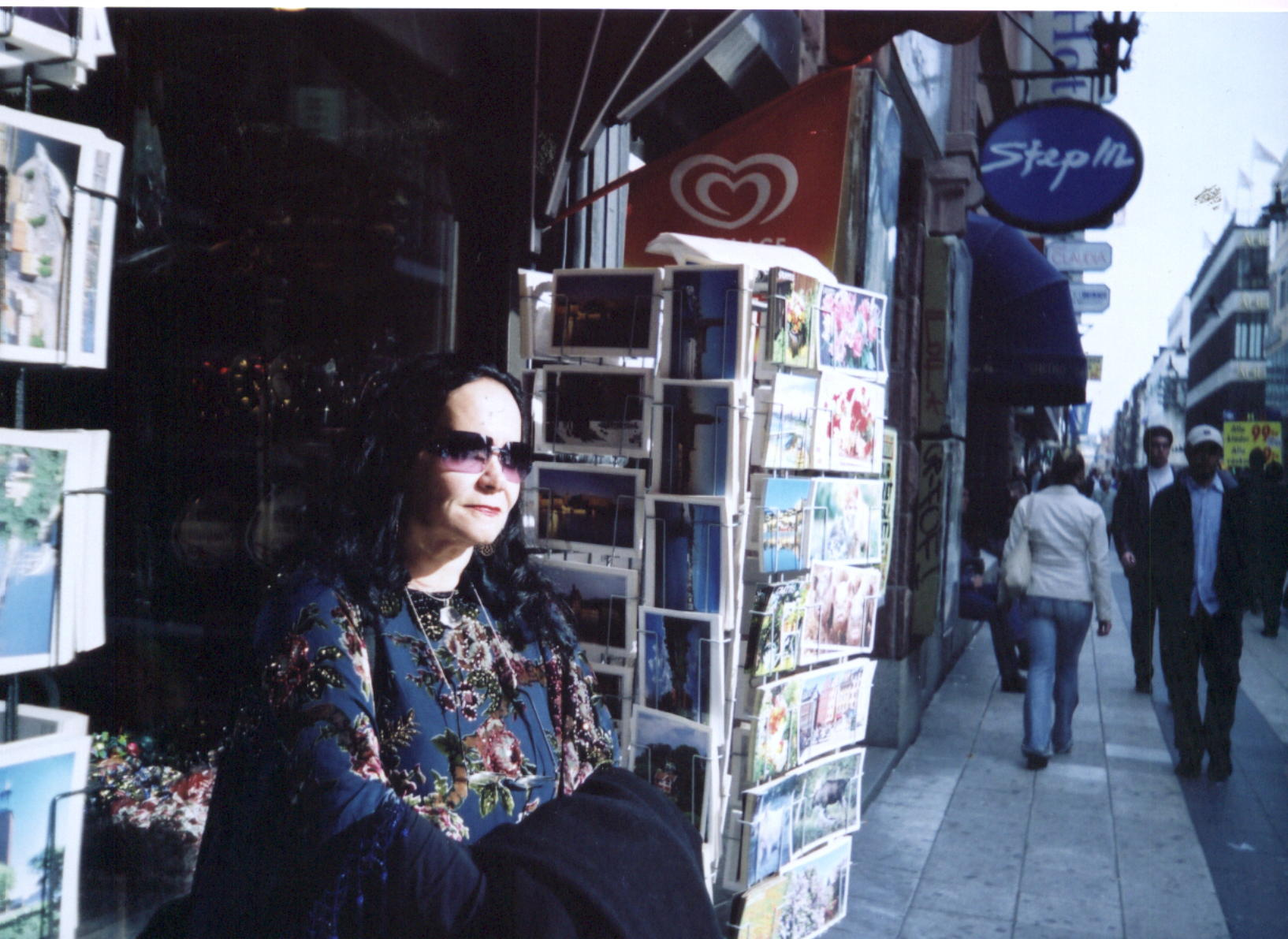 Template:Lucila Nogueira, em Estolcomo